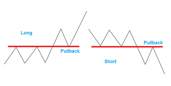 Pullback na doorbraak steun of weesrstand